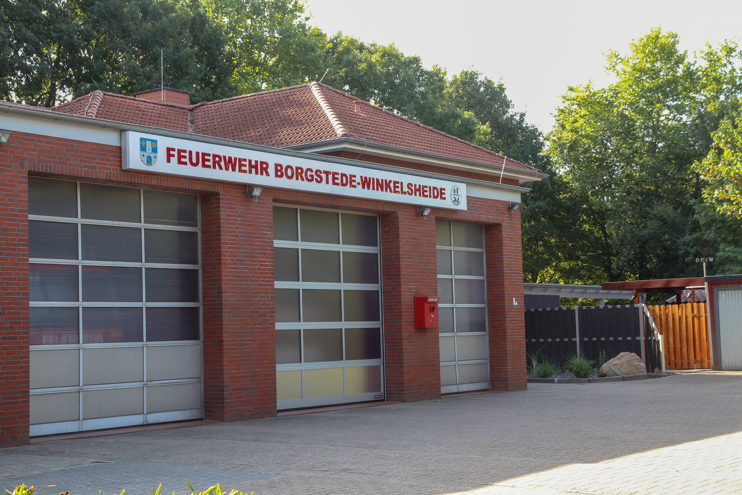 Gerätehaus der Feuerwehr Borgstede-Winkelsheide